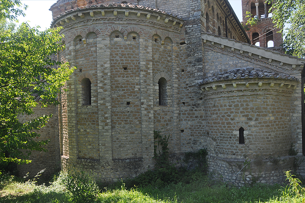 San Giovanni in Argentella - Palombara Sabina